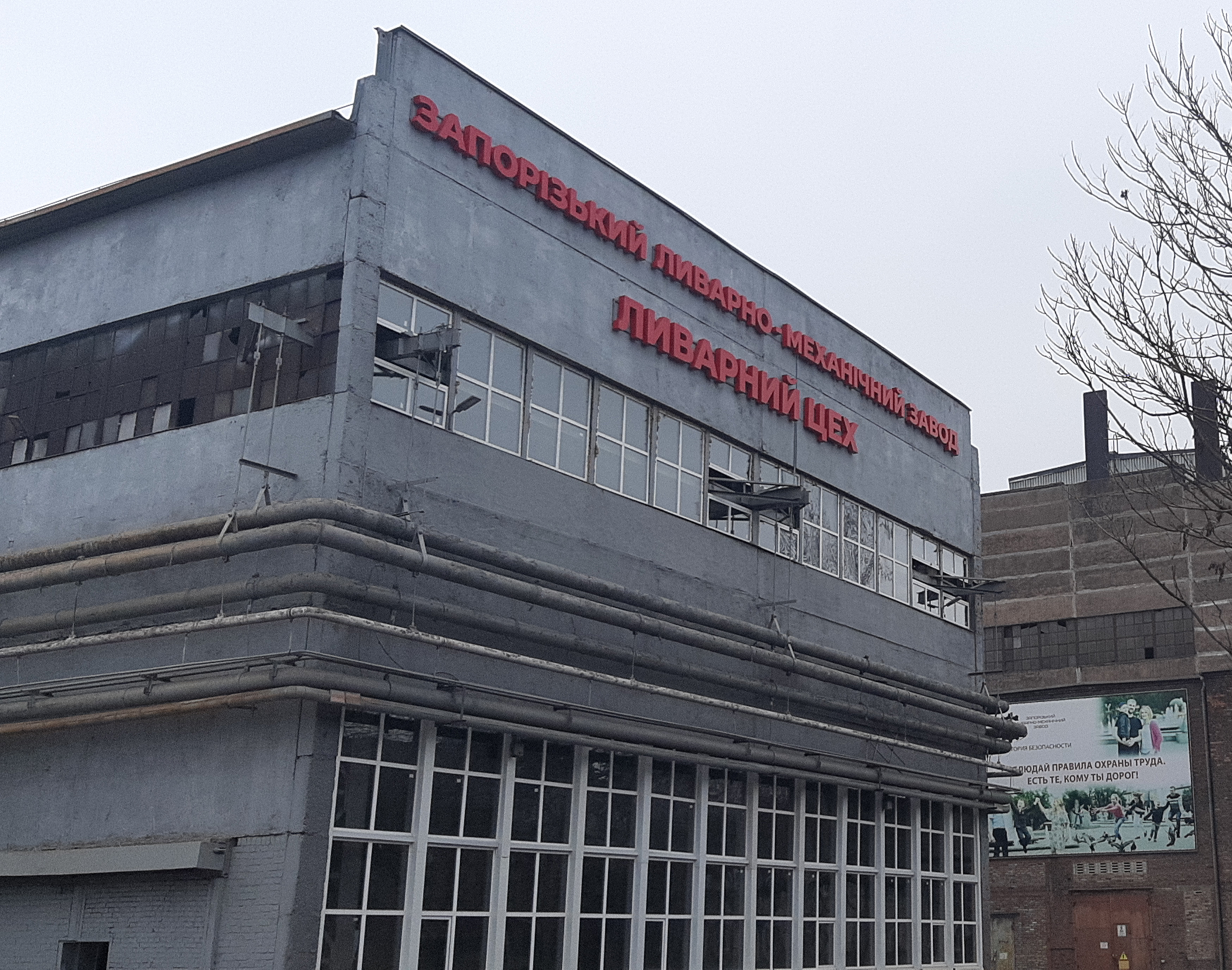 Ділянка фрезерних верстатів ливарного цеху